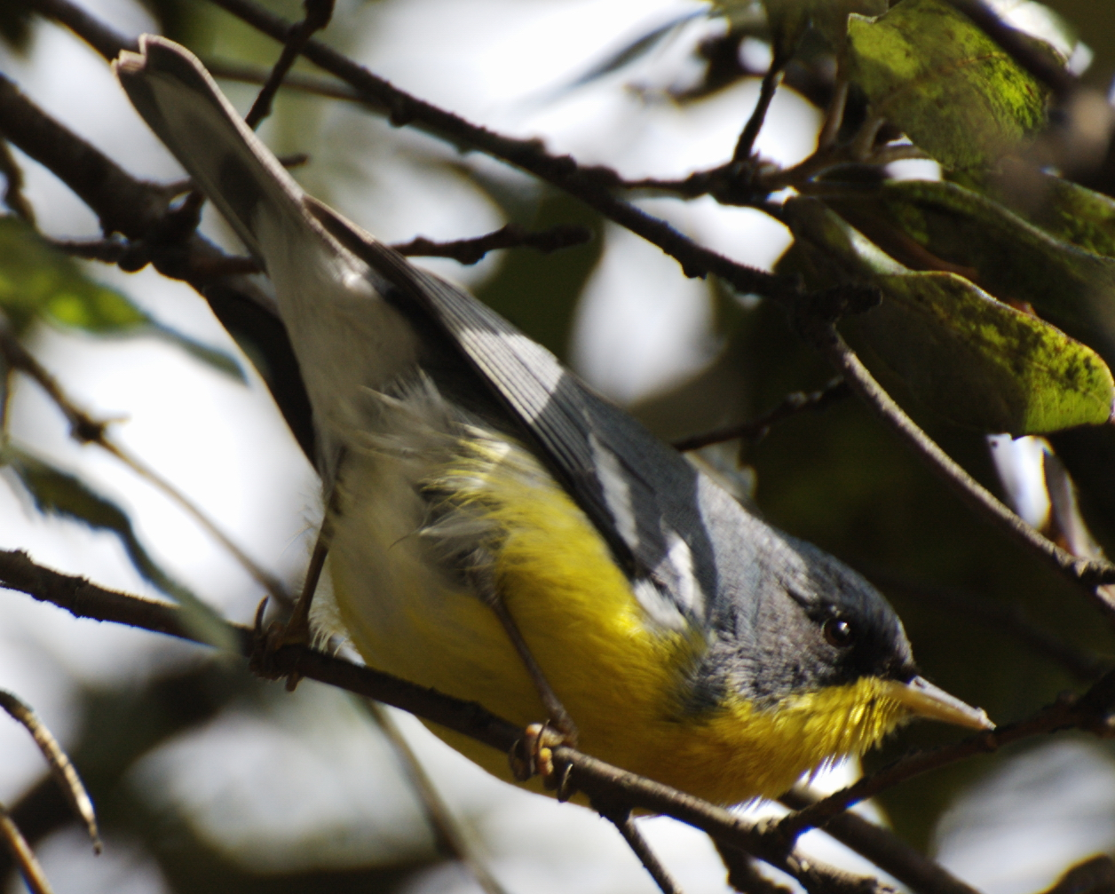 Parula pitiayumi PITIAYUMI